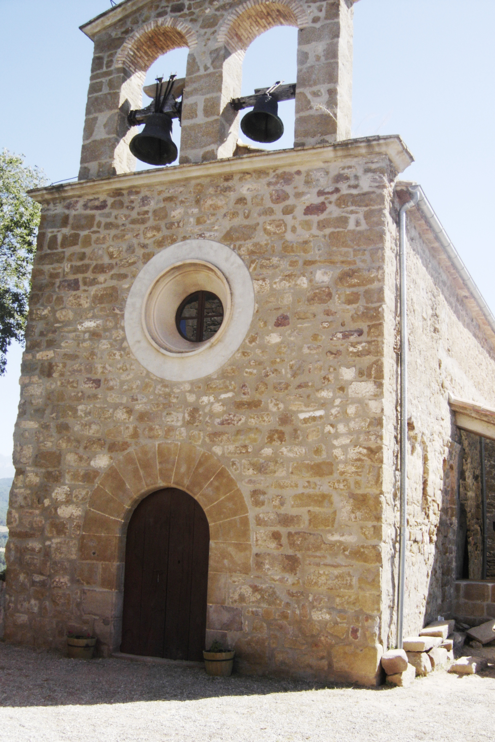 La nova façana de l'església de Ceuró. L'antiga va ser destruïda per un llap l'any 1905.